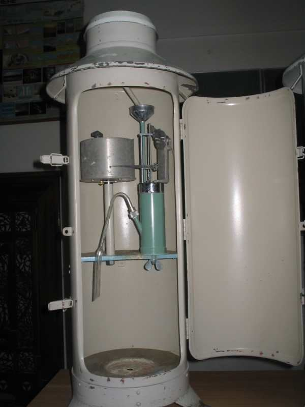 Pluwiograf Uniwersytetu Mikołaja Kopernika w Toruniu.